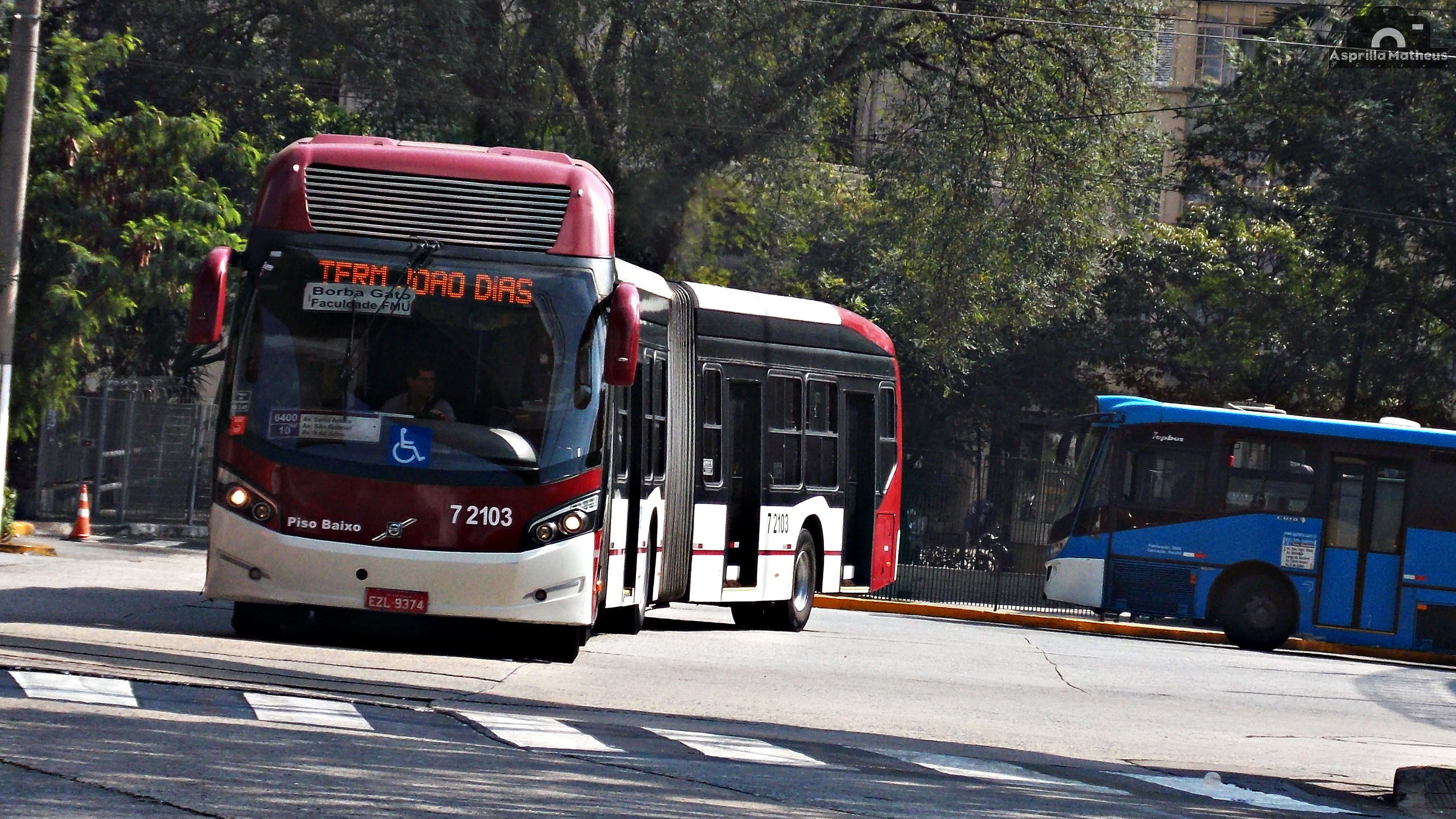 Veículo Bi-Articulado, sobre Chassi B360S